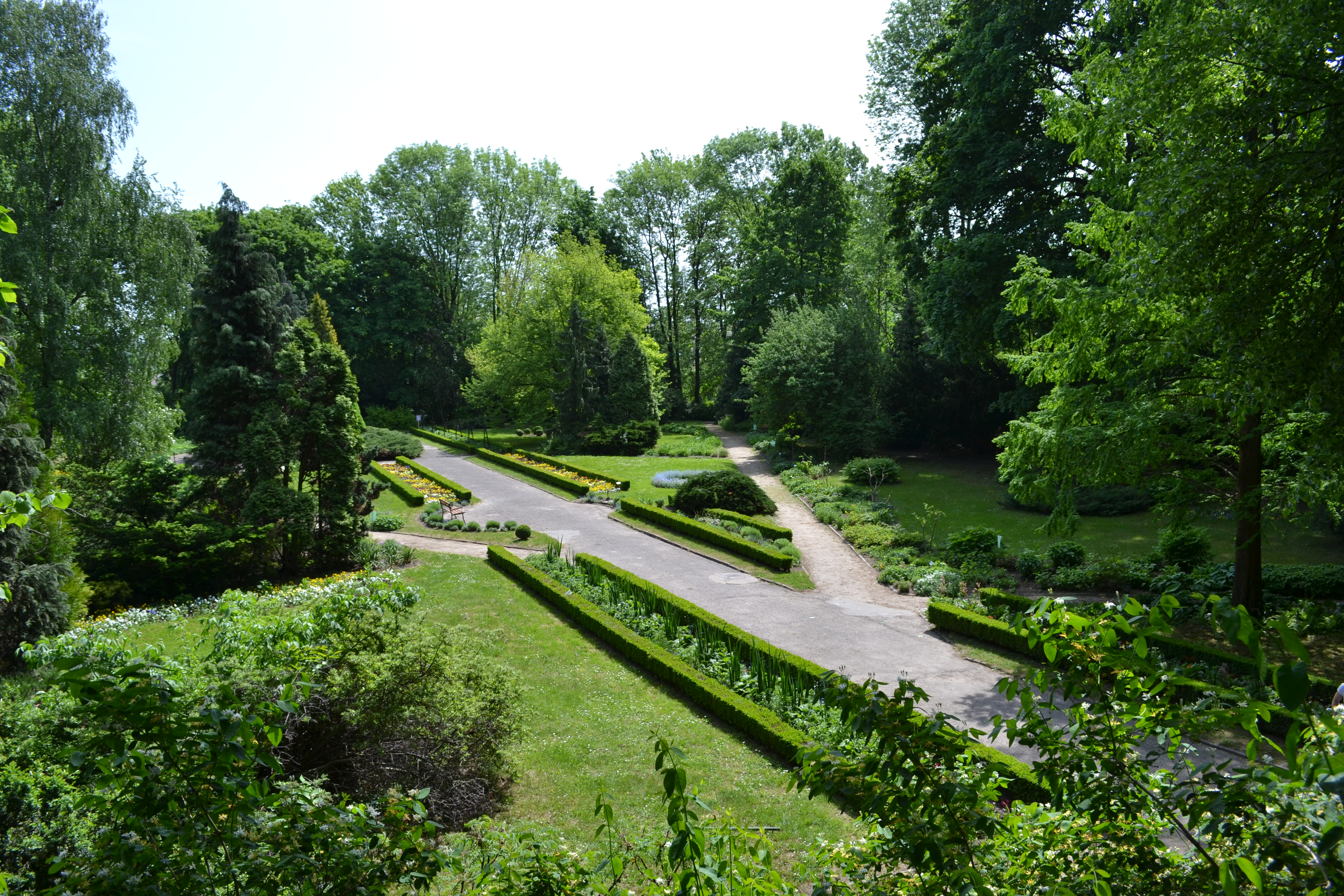 Ogród Botaniczny UMCS w Lublinie. Dział Roślin Ozdobnych „PAŁACÓWKA”